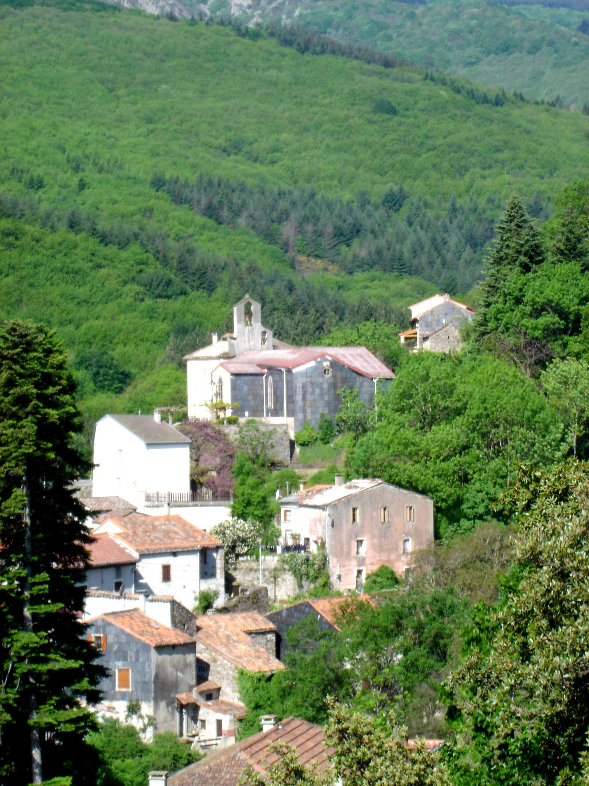 Castanet-le-Haut (Hérault) - Vu depuis le chemin de Pabeau.